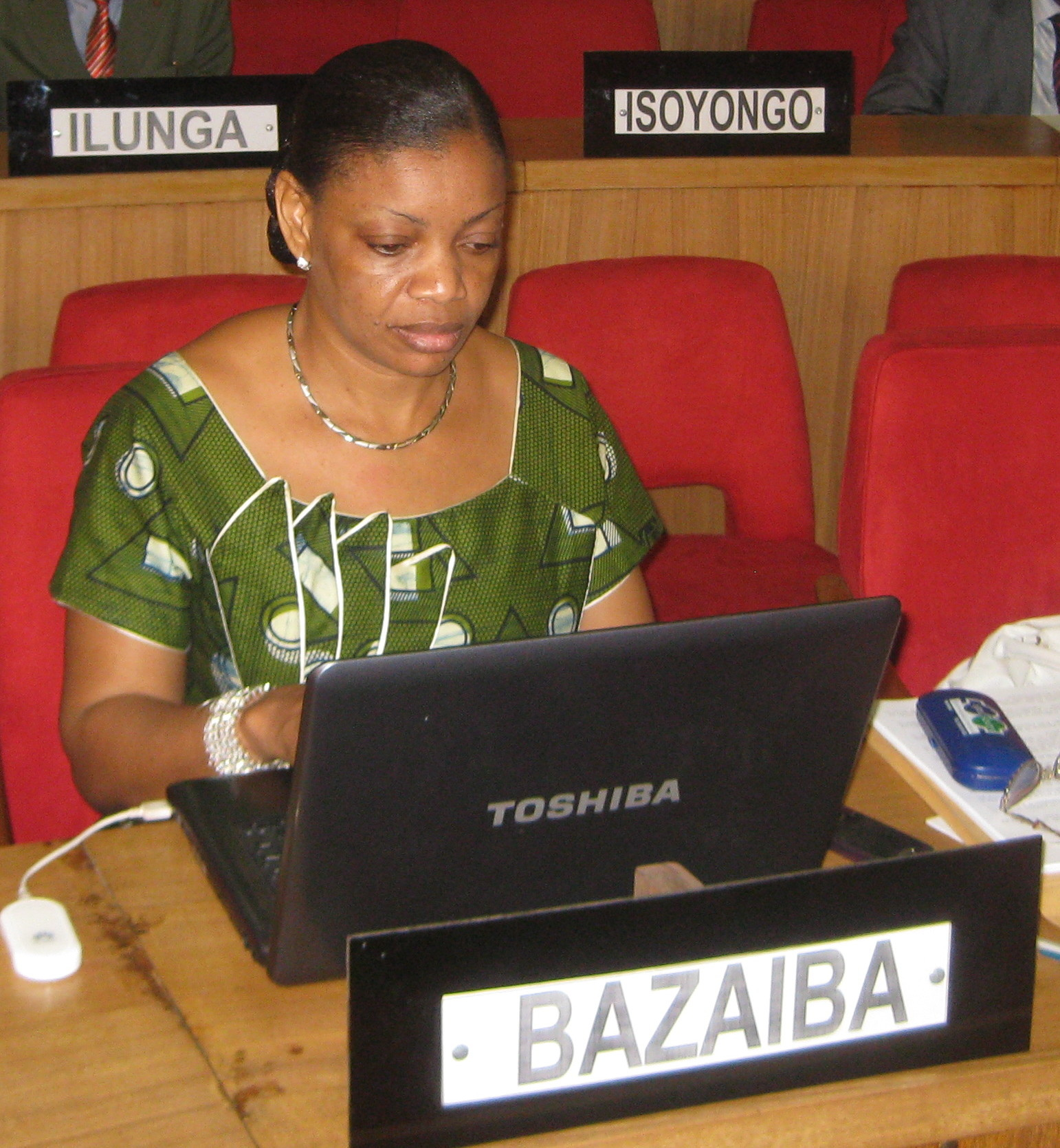 Ève Bazaiba, sénatrice congolaise, en séance; Sénateurs congolais (Congo-Kinshasa) en séance, photo prise le 14 octobre 2009 par Radio Okapi.